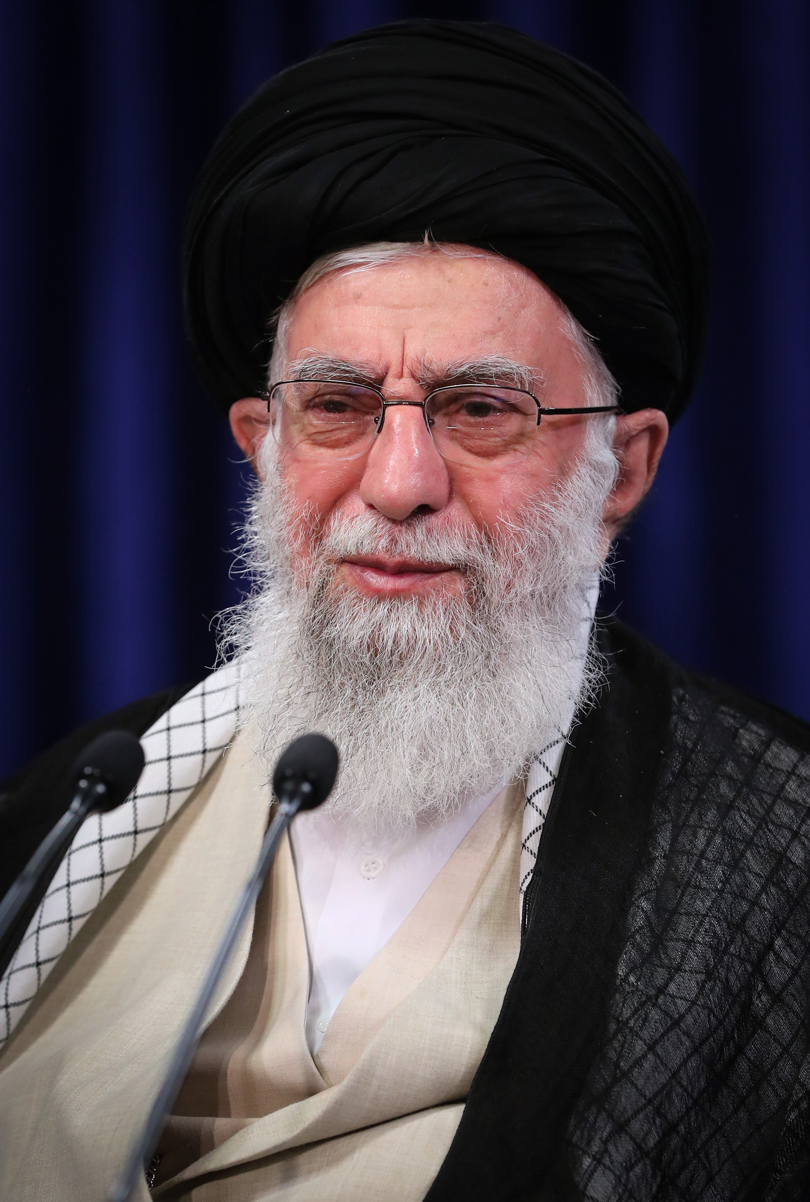 علی خامنه ای رهبر ایران در شهریور 1399